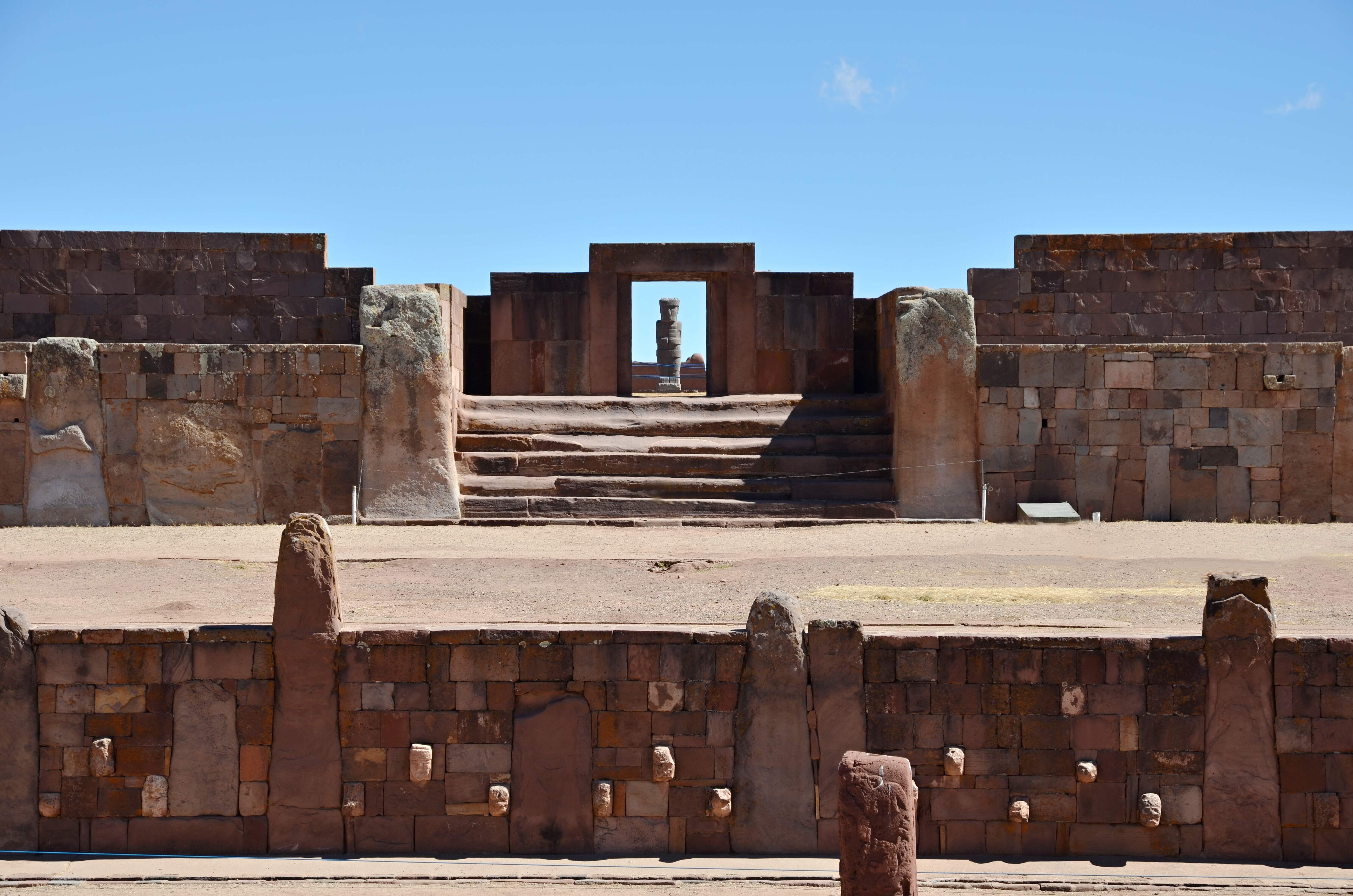 Templo de Kalasasaya a socha Monolito Ponce - Tiwanaku